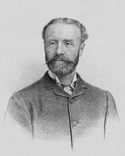 Lord Cavan